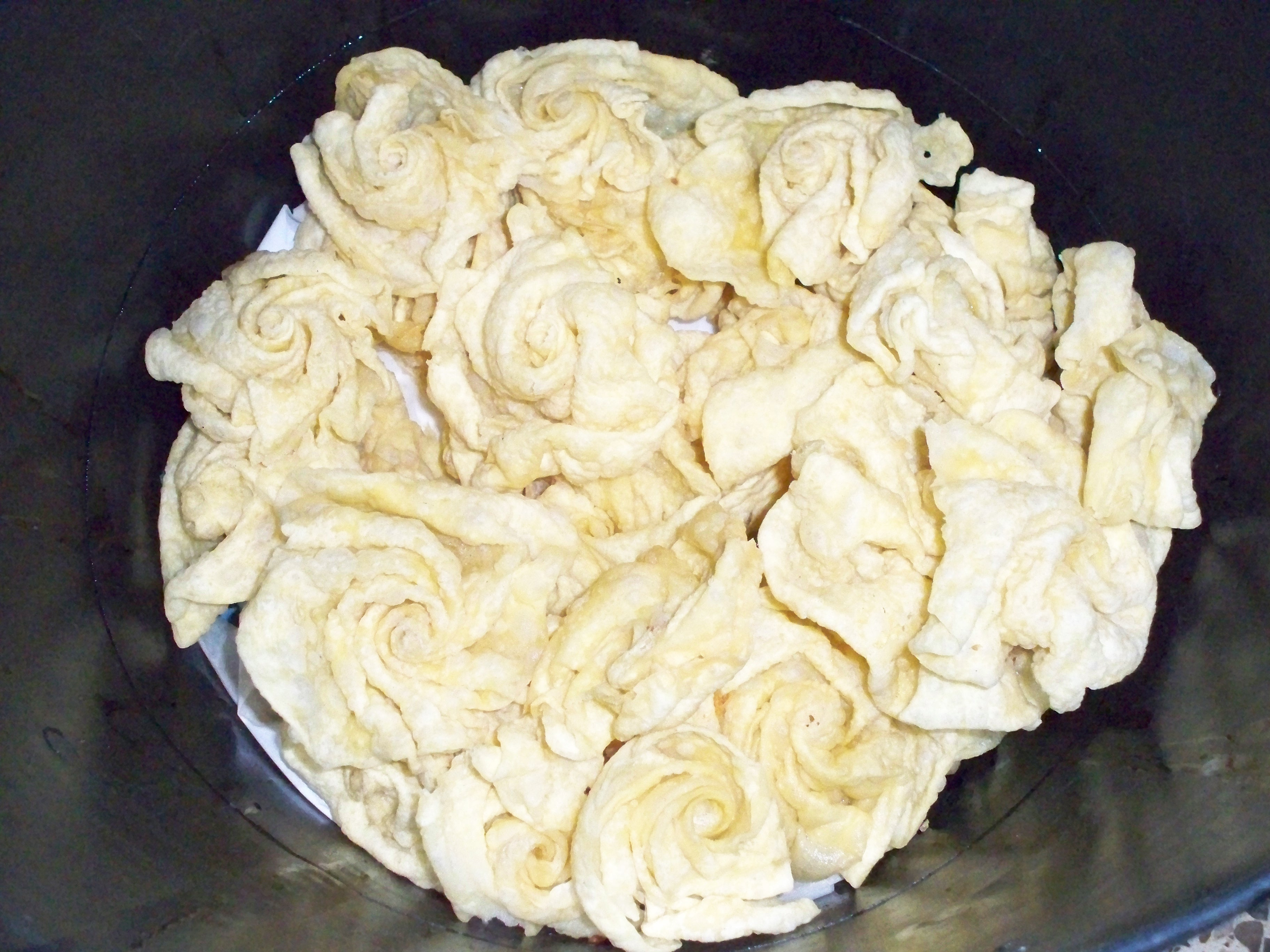 Fotografía de un plato de hojuelas, dulce típico de la sierra albaceteña. Suelen recubrirse de un fino manto de miel de romero.